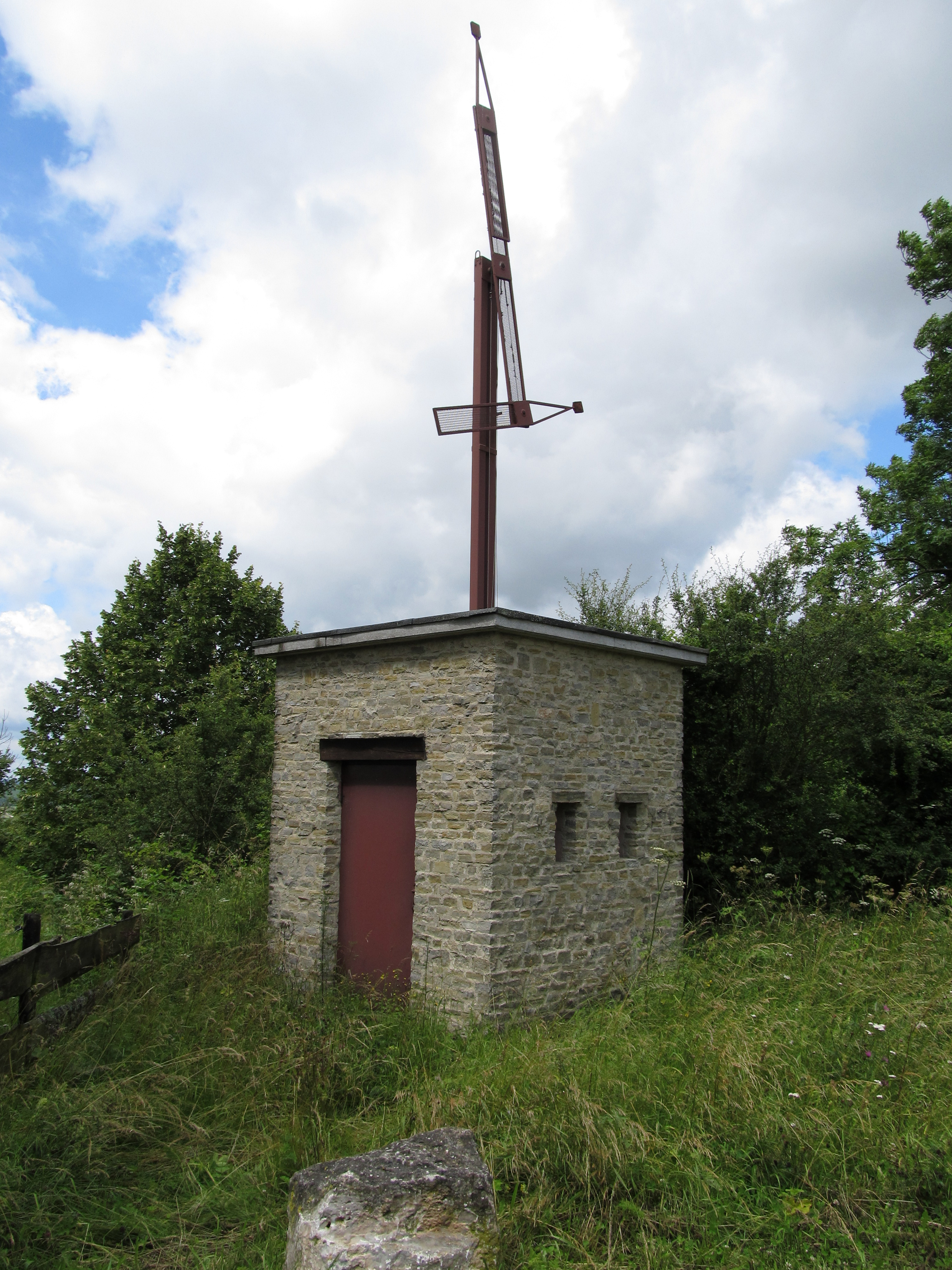 Optischer Telegraf auf dem Hölschberg bei Biesingen, einem Stadtteil von Blieskastel, Saarland